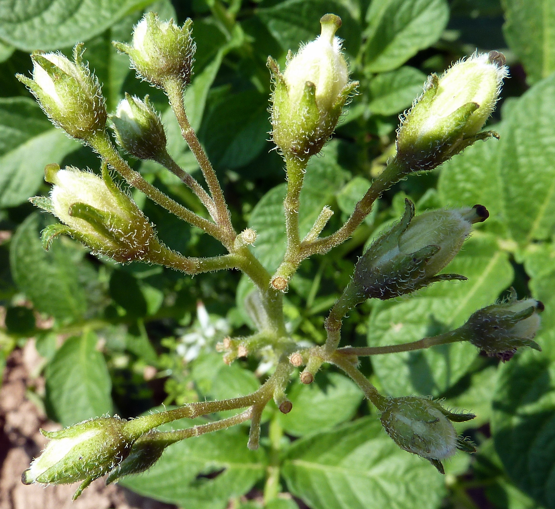 Solanum tuberosum (Patata) : Inflorescencia pre antesis - Camino del Rincón, Albatera (Alicante, España).